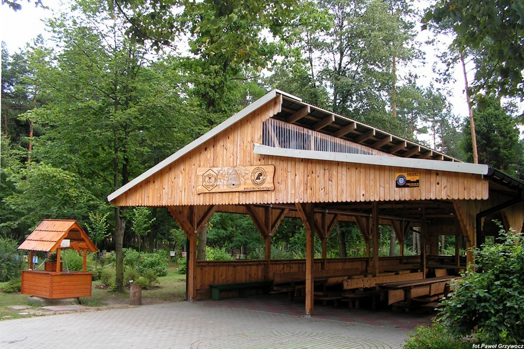 Katowice - Hamerla, teren Śląskiego Związku Pszczelarzy i Nadleśnictwa Katowice.